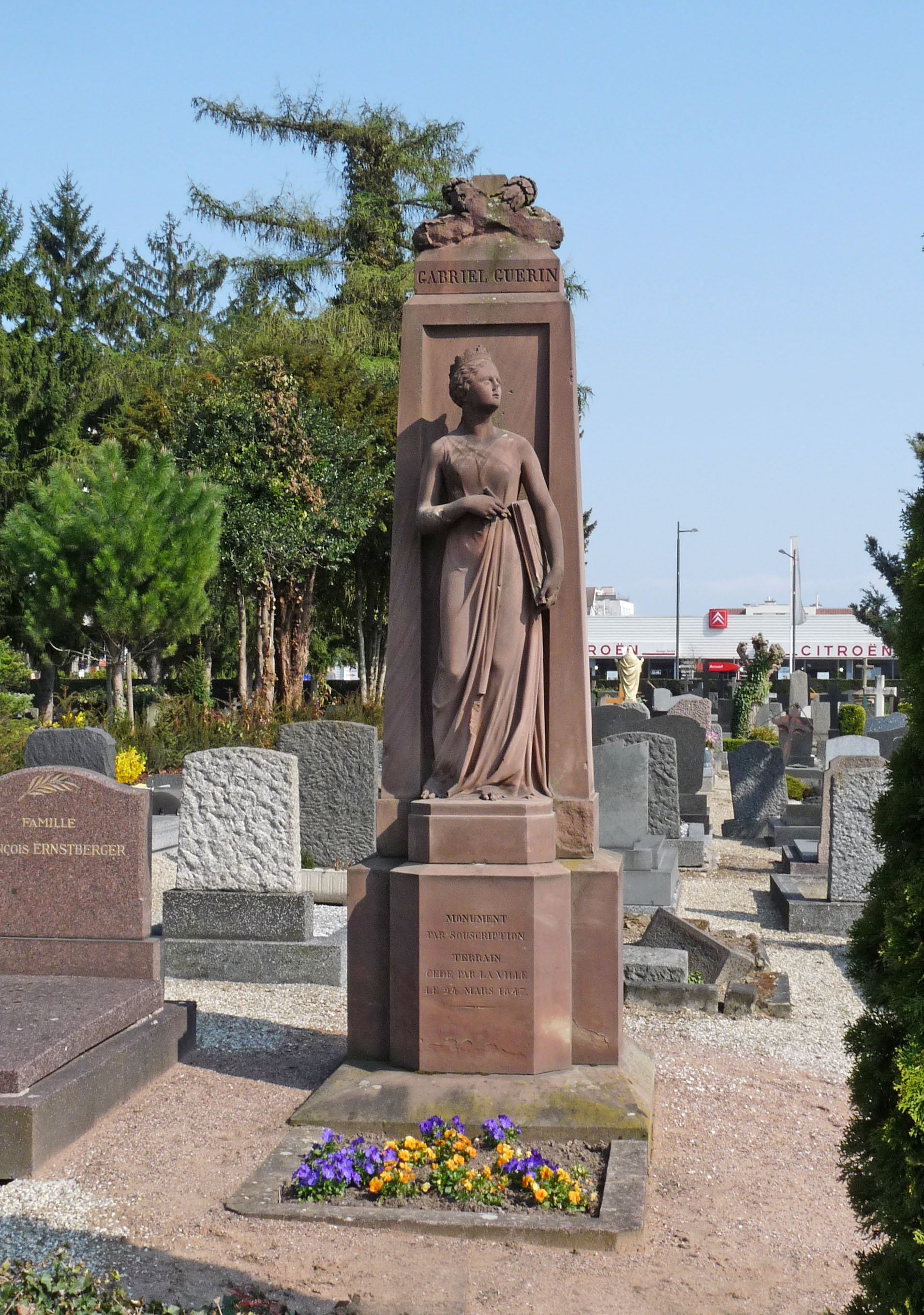 Tombe de la famille de Gabriel Guérin au cimetière Sainte-Hélène de Strasbourg. Réalisée par le sculpteur André Friederich. Outre celui de Gabriel Guérin qui est gravé sur l'entablement, d'autres noms sont inscrits à l'arrière du monument : Jean Guérin (grand-père), Christophe (père) et Valérie (fille).